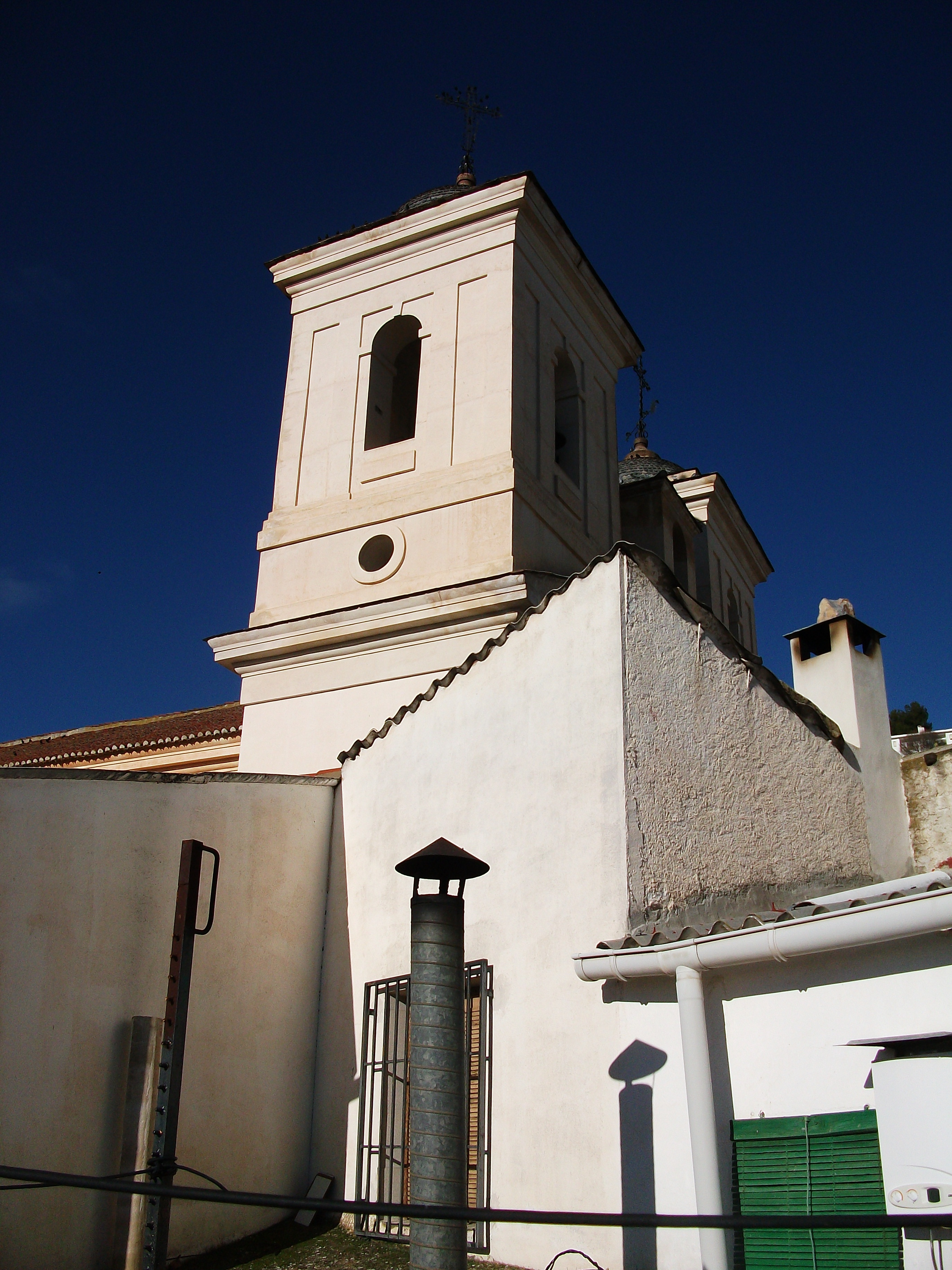 Iglesia de San Miguel de Murtas. Neoclásica. Enero de 2011